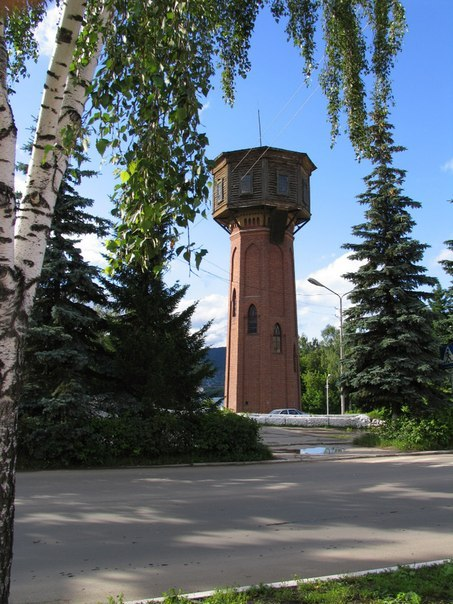 Башня водонапорная (Республика Башкортостан, Белорецк, перекресток улица Точисского и улица Ленина)